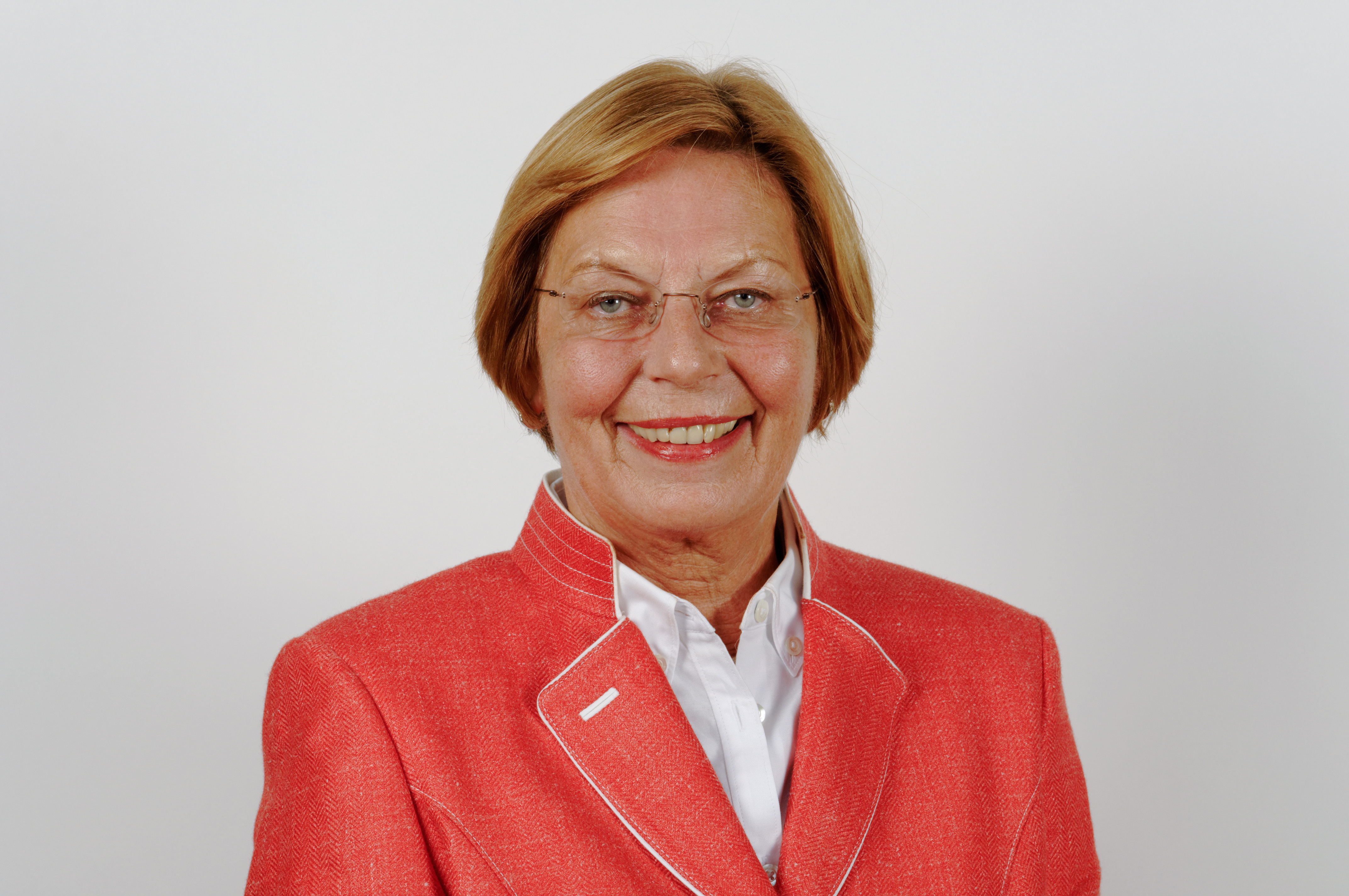 Landtagsprojekt Bayern